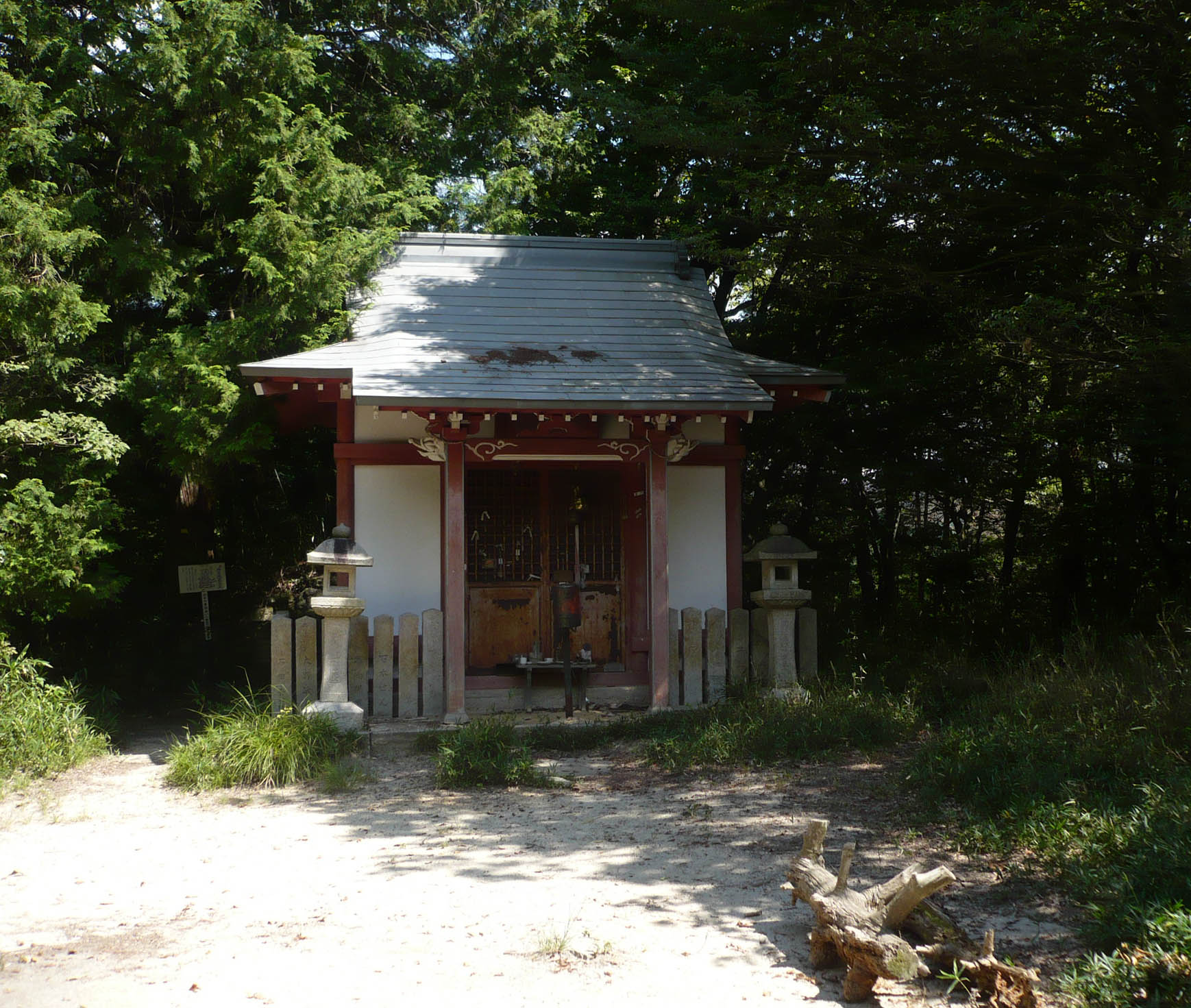 奥之院狸谷不動院